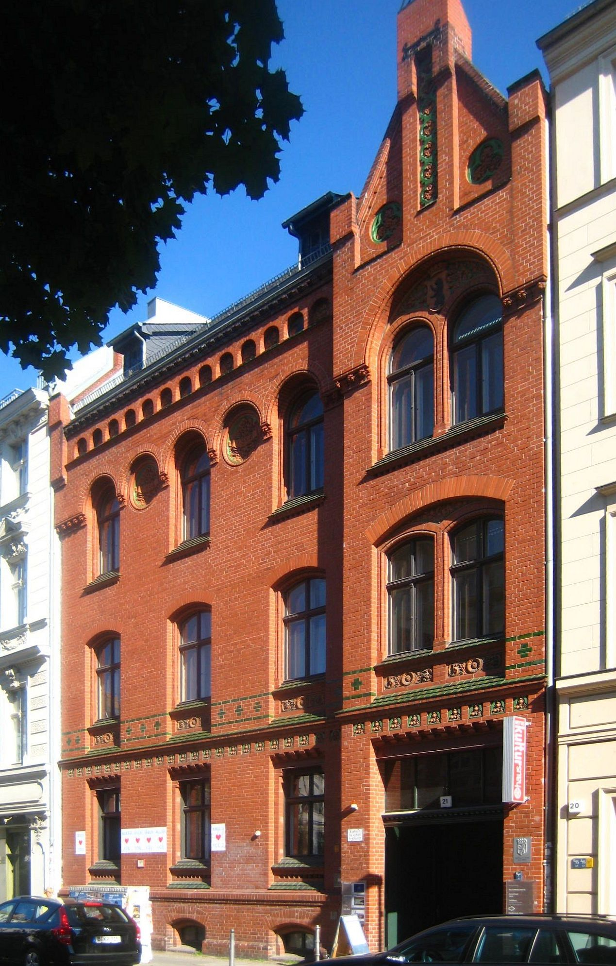 Ehemaliges Lehrerwohnhaus der 10. Realschule in der Auguststraße 21 in Berlin-Mitte, heute Vorderhaus des Kulturhauses Mitte. Der Komplex mit dem Lehrerwohnhaus an der Straßenfront und dem Schulgebäude im Hof entstand 1895 nach Plänen von Hermann Blankenstein und Paul Hesse. Er ist als Baudenkmal gelistet.